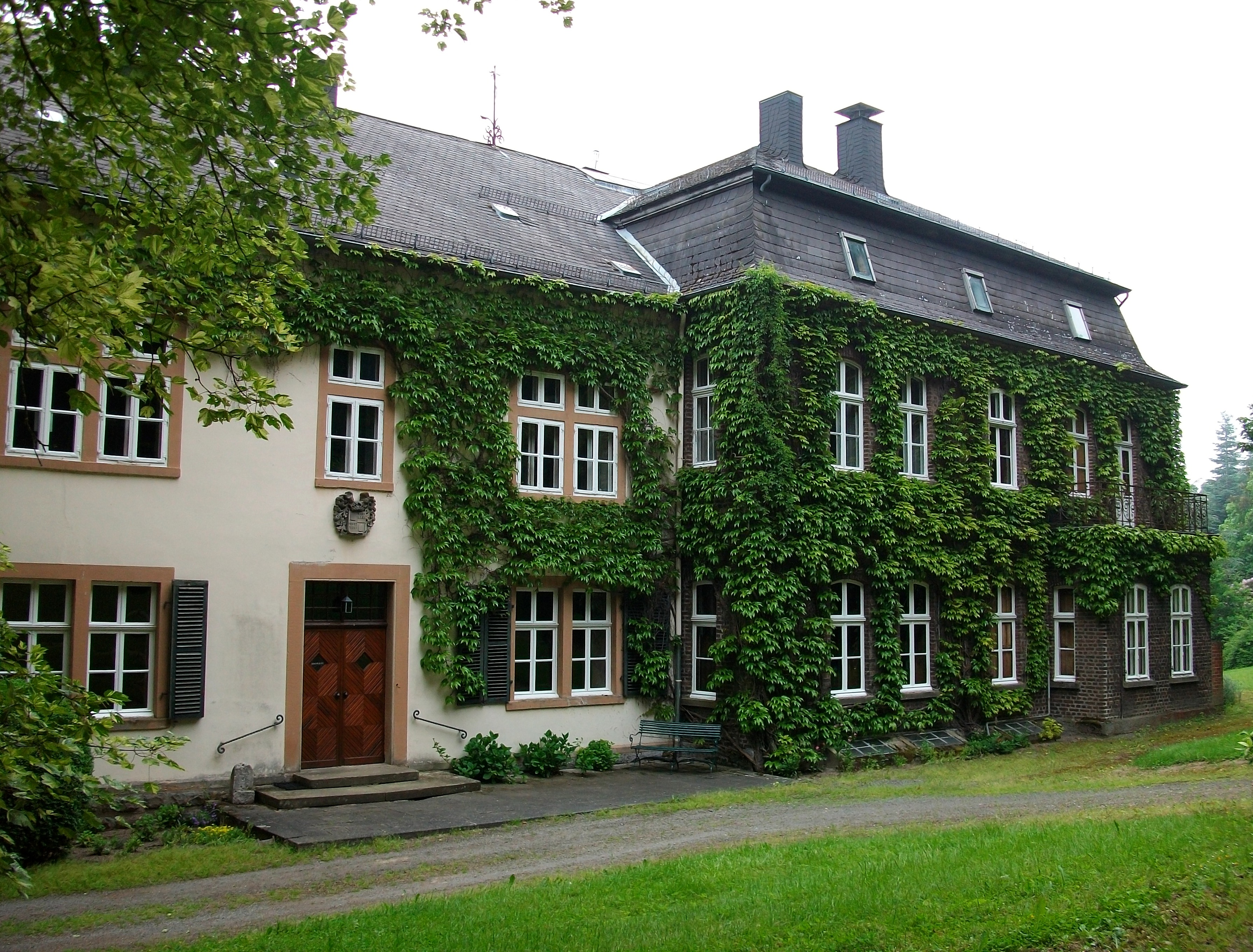 Schloss Padberg in Marsberg-Padberg (Germany)